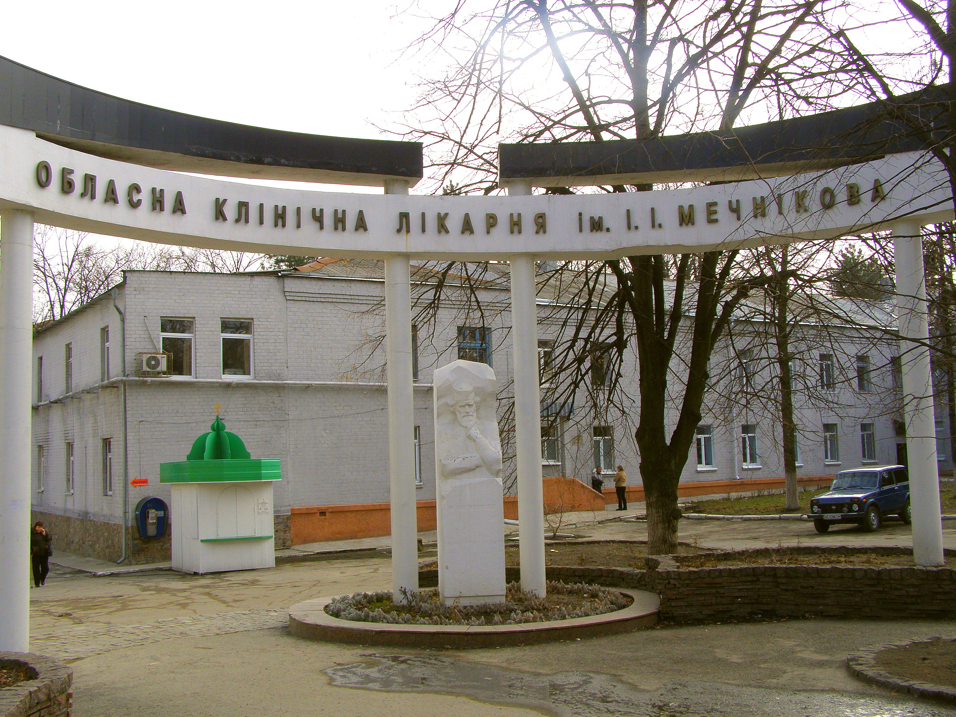 Возле входа на территорию